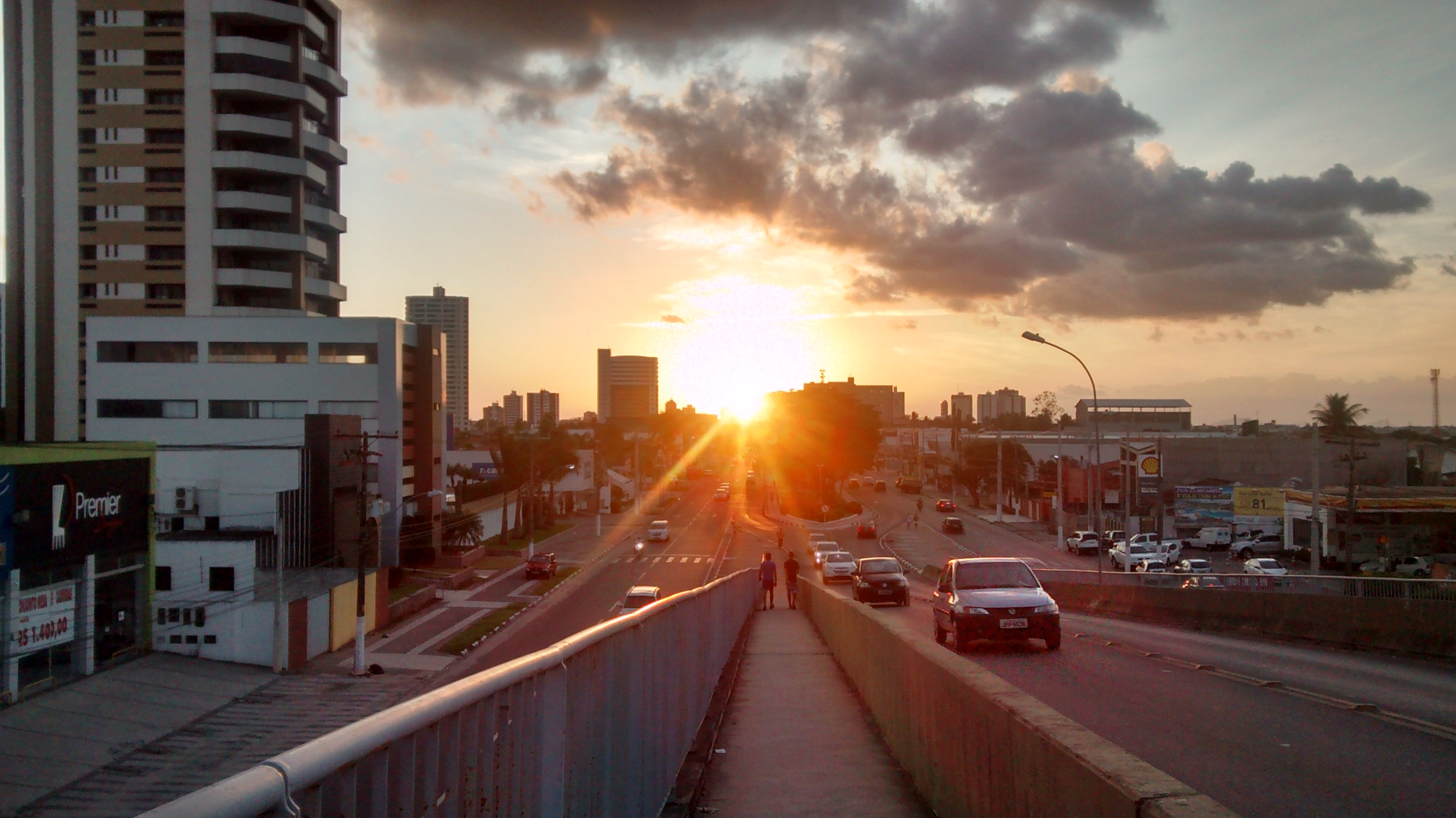 Avenida Getúlio Vargas, em Feira de Santana-BA